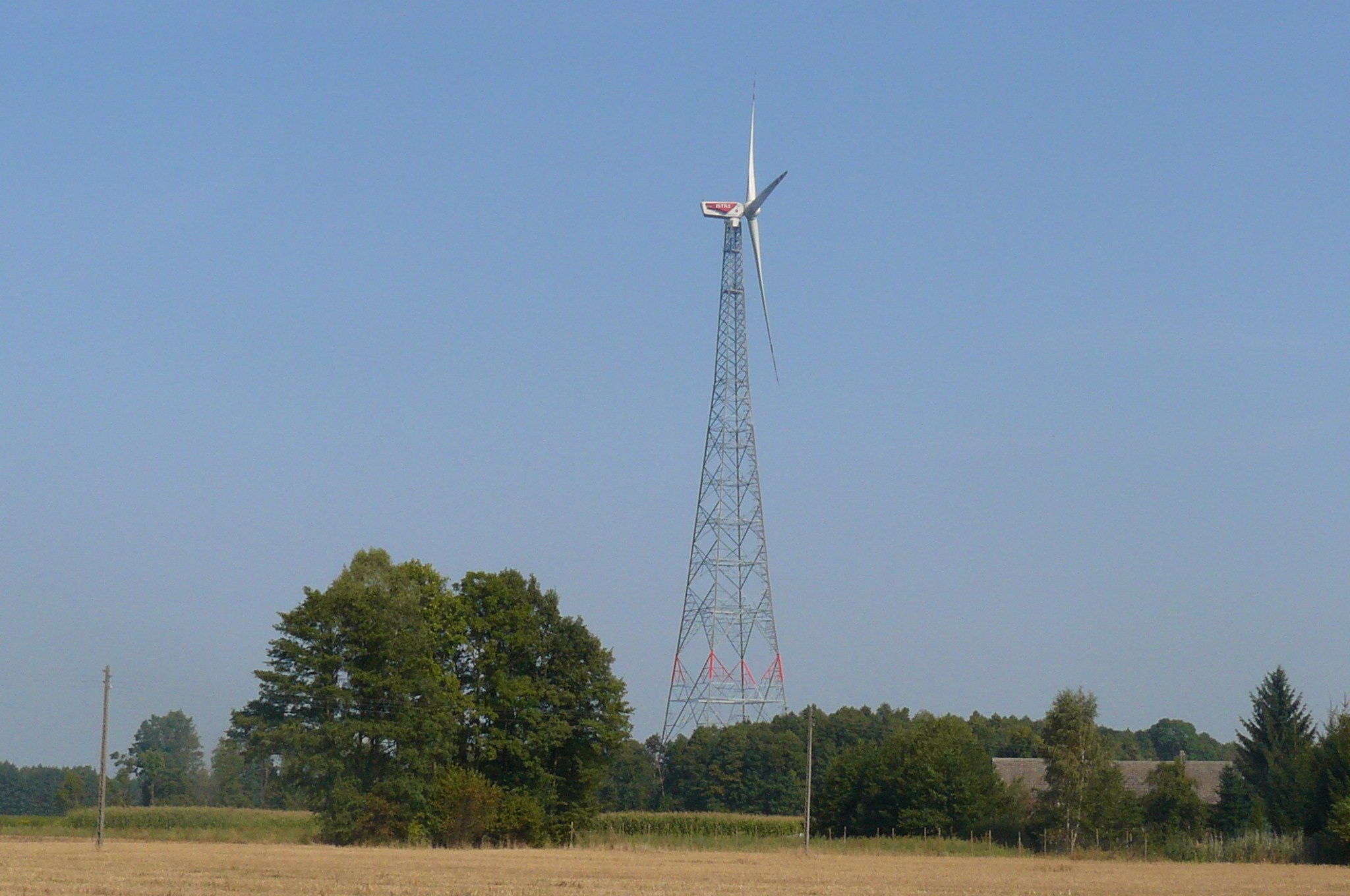 Paproć, najwyższe wiatraki na świecie. 210 m.